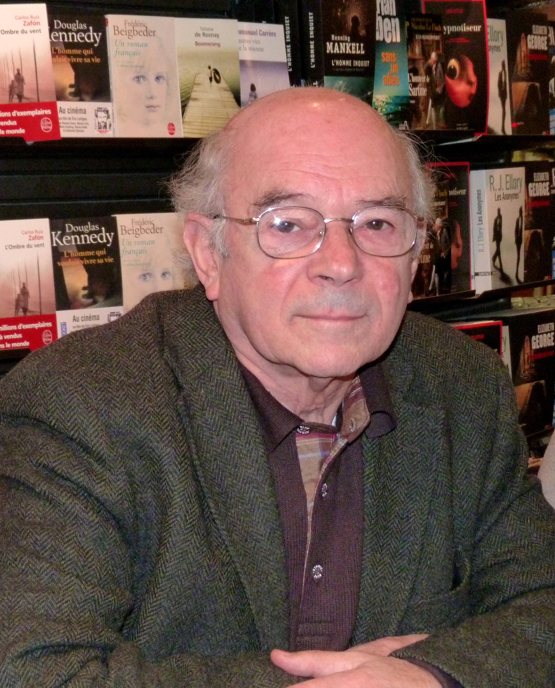 Robert Bober, lors d'une signature à la FNAC Forum à Paris, pour son livre "On ne peut plus dormir tranquille quand on aune fois ouvert les yeux", le 26 novembre 2010.